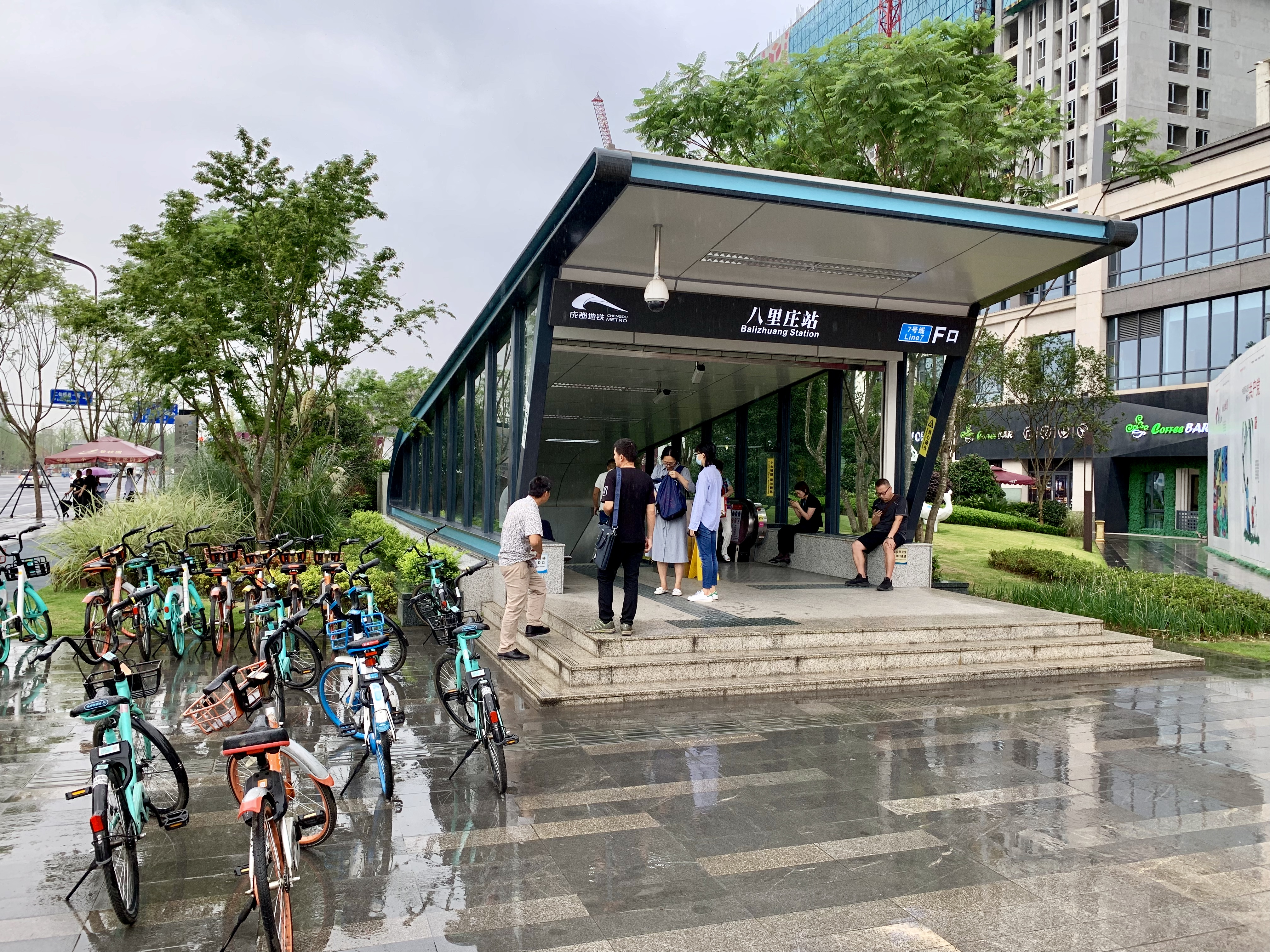 成都地铁7号线八里庄站